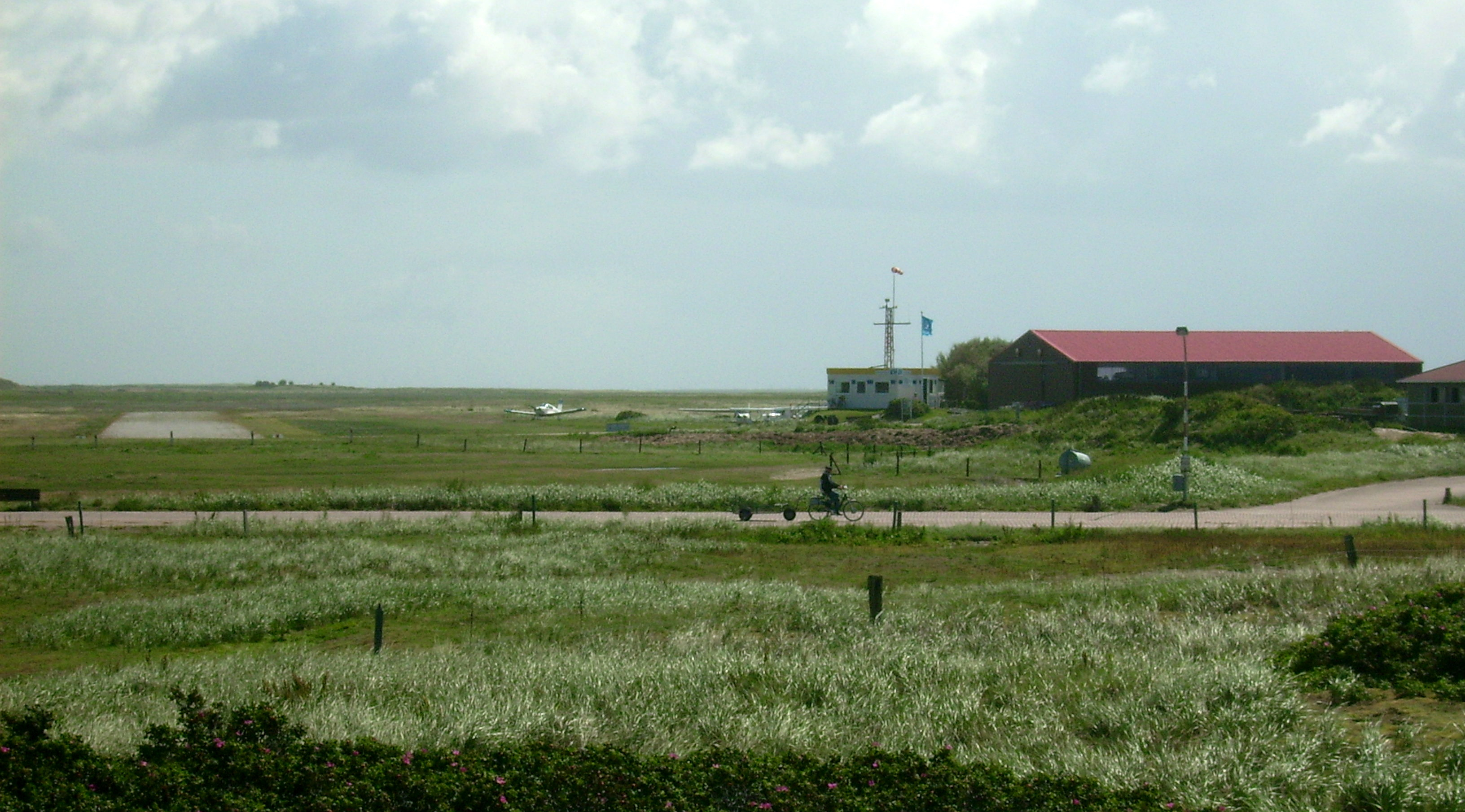 Flughafen auf Baltrum